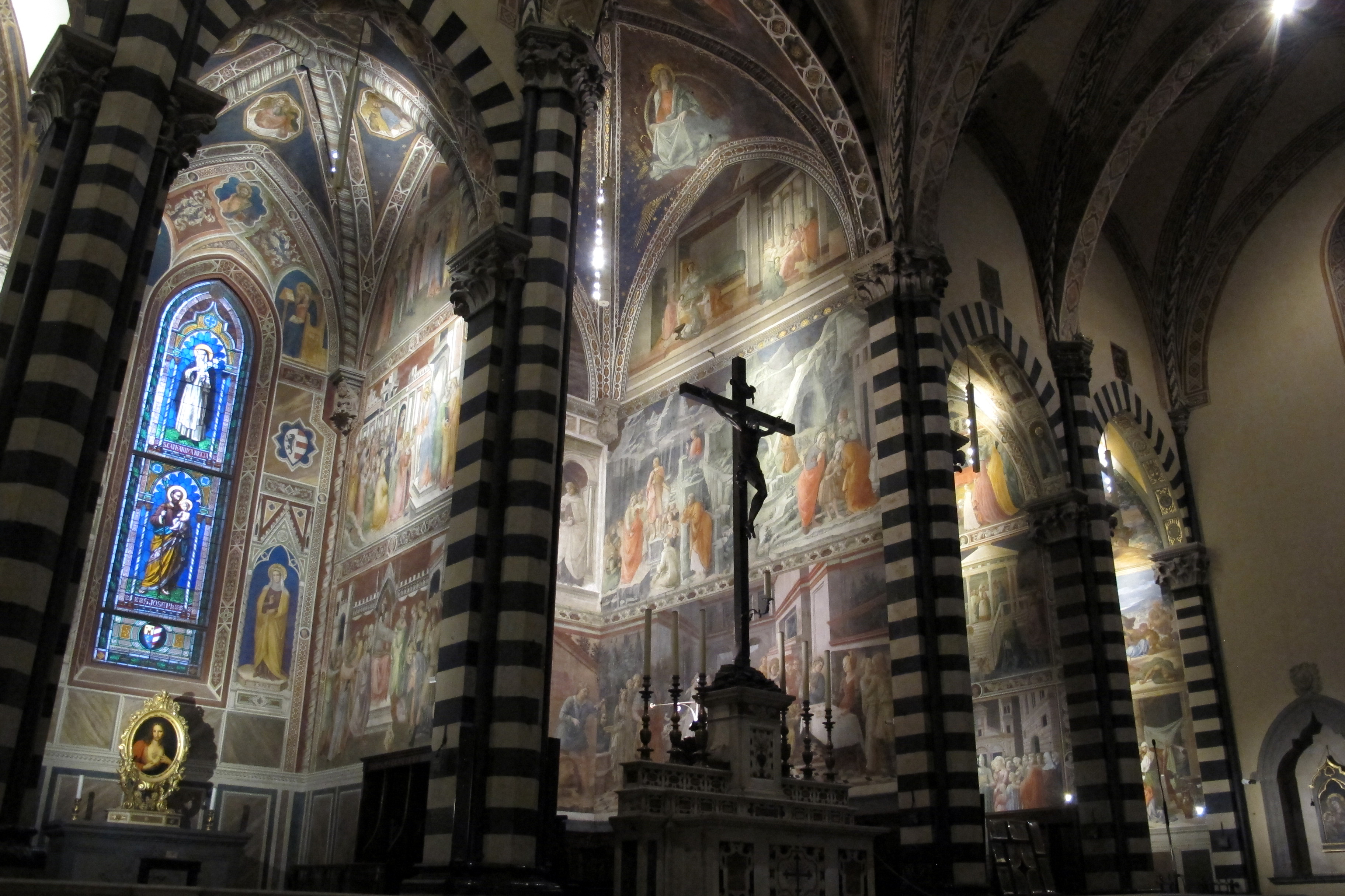 Duomo di Prato